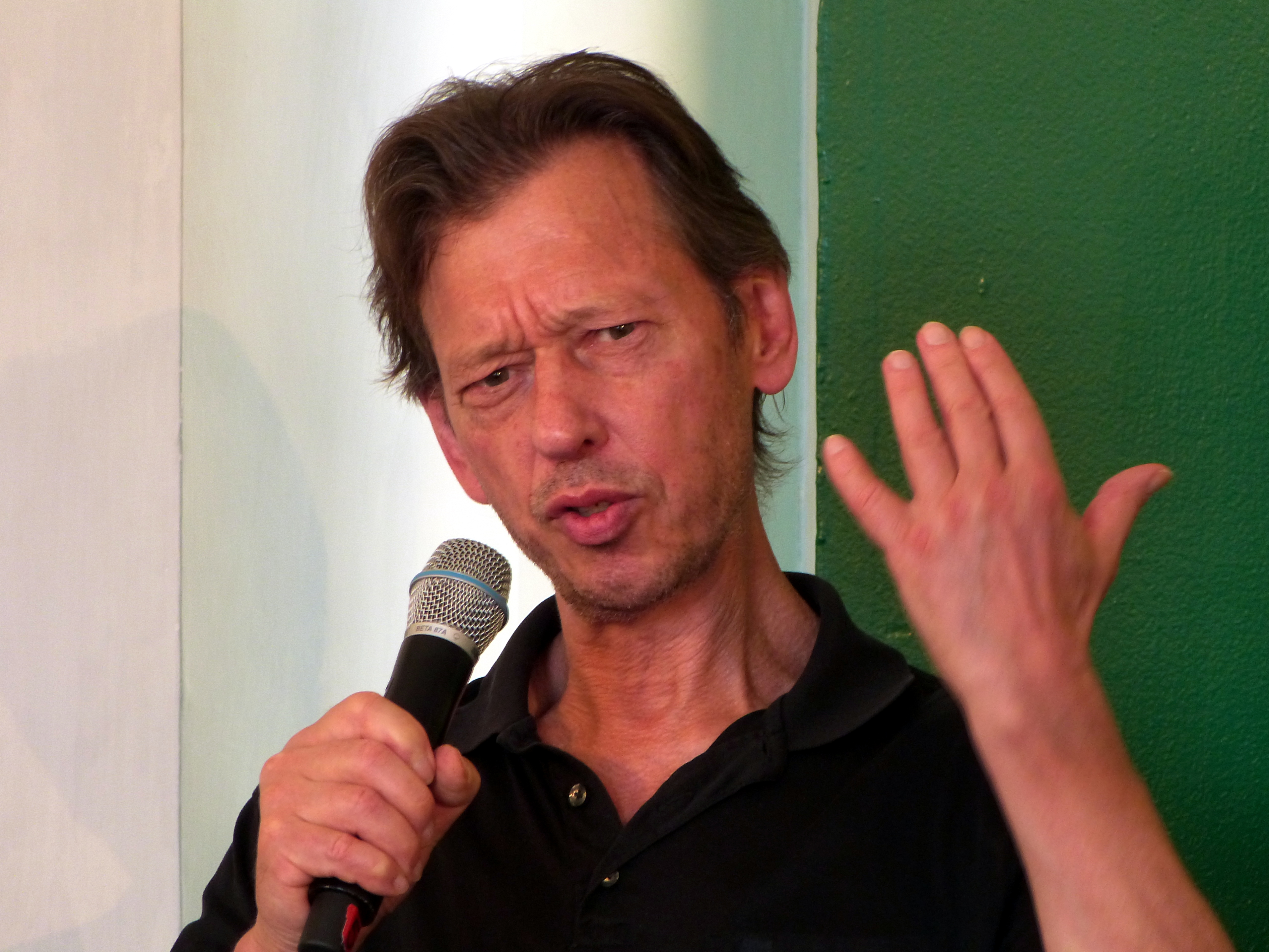 Klaus Englert hat in Germanistik und Philosophie promoviert. Er arbeitet als freier Journalist für Zeitungen und den Rundfunk, sein Spezialgebiet ist Architektur.